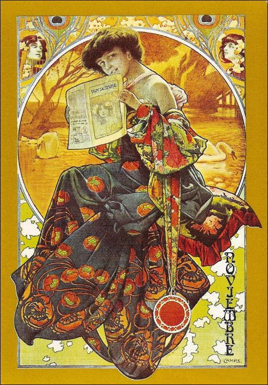 Noviembre